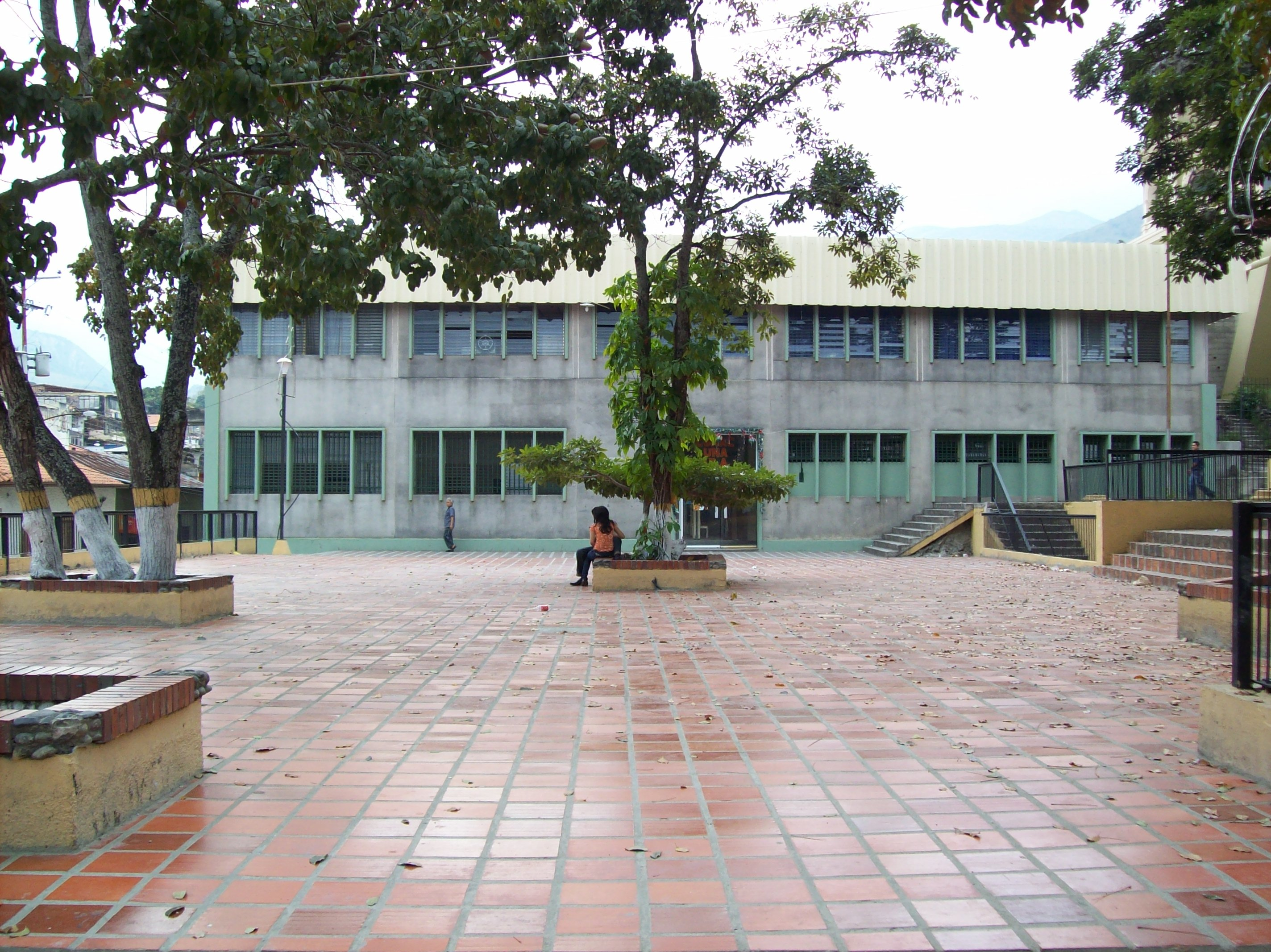 Sede del Nucleo Universitario "Valle del Mocotíes" de la Universidad de Los Andes